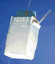 Radiasonde RS60